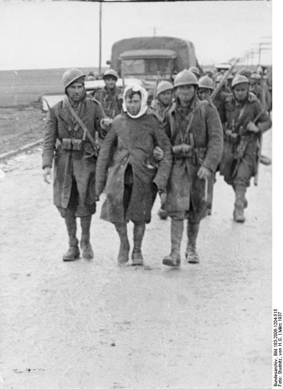 Die grosse Winterschlacht um Guadalajara Anfang März begann die grosse Offensive der nationalen Truppen auf Gudalajara, deren Hauptstoss auf der Strasse Madrid - Saragossa (Carretera de Aragon) geführt wurde. Die ausserordentlich schweren Kämpfe nahmen einen wechselnden Verlauf; das Kriegsglück, das sich im Anfang den Nationalen zuneigte, wandte sich später den Roten zu. Kälte, Hagelsturm, aufgeweichter Boden und scharfe Winde erwiesen sich oft als schlimmere Gegner als das feindliche Feuer. Die Soldaten der ersten beiden freiwilligen Divisionen lagen fünf Tage lang in Schlamm und Dreck, ohne warmes Essen. Zum ersten Male im spanischen Bürgerkrieg wurden ausschließlich motorisierte Einheiten eingesetzt. Erschöpft kommen die Truppen nach ihrer Ablösung von der Front zurück. Ein Verwundeter wird von zwei Kameraden gestützt. Bei Abdruck nennen:. H.G. von Studnitz - Scherl Bilderdienst 29.3.1937